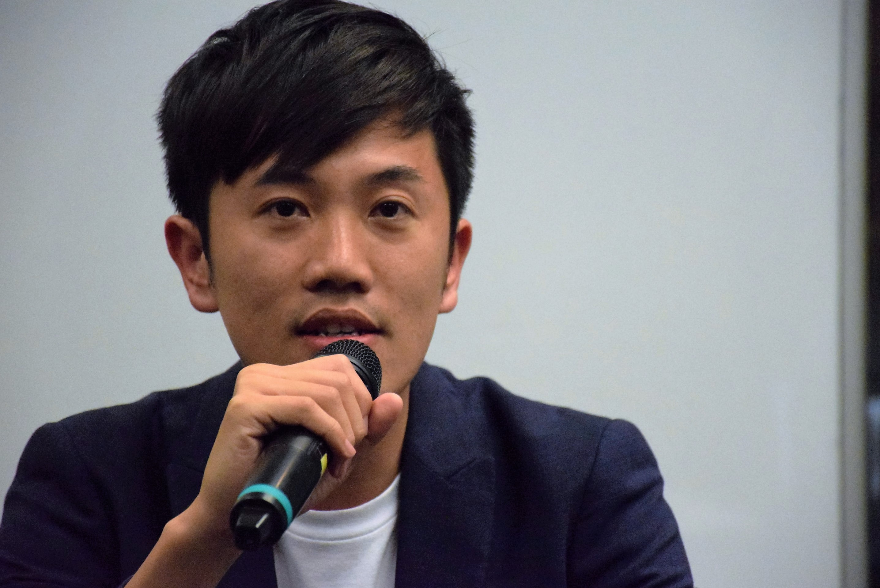 香港立法會議員鄭松泰 （美國之音湯惠芸拍攝）